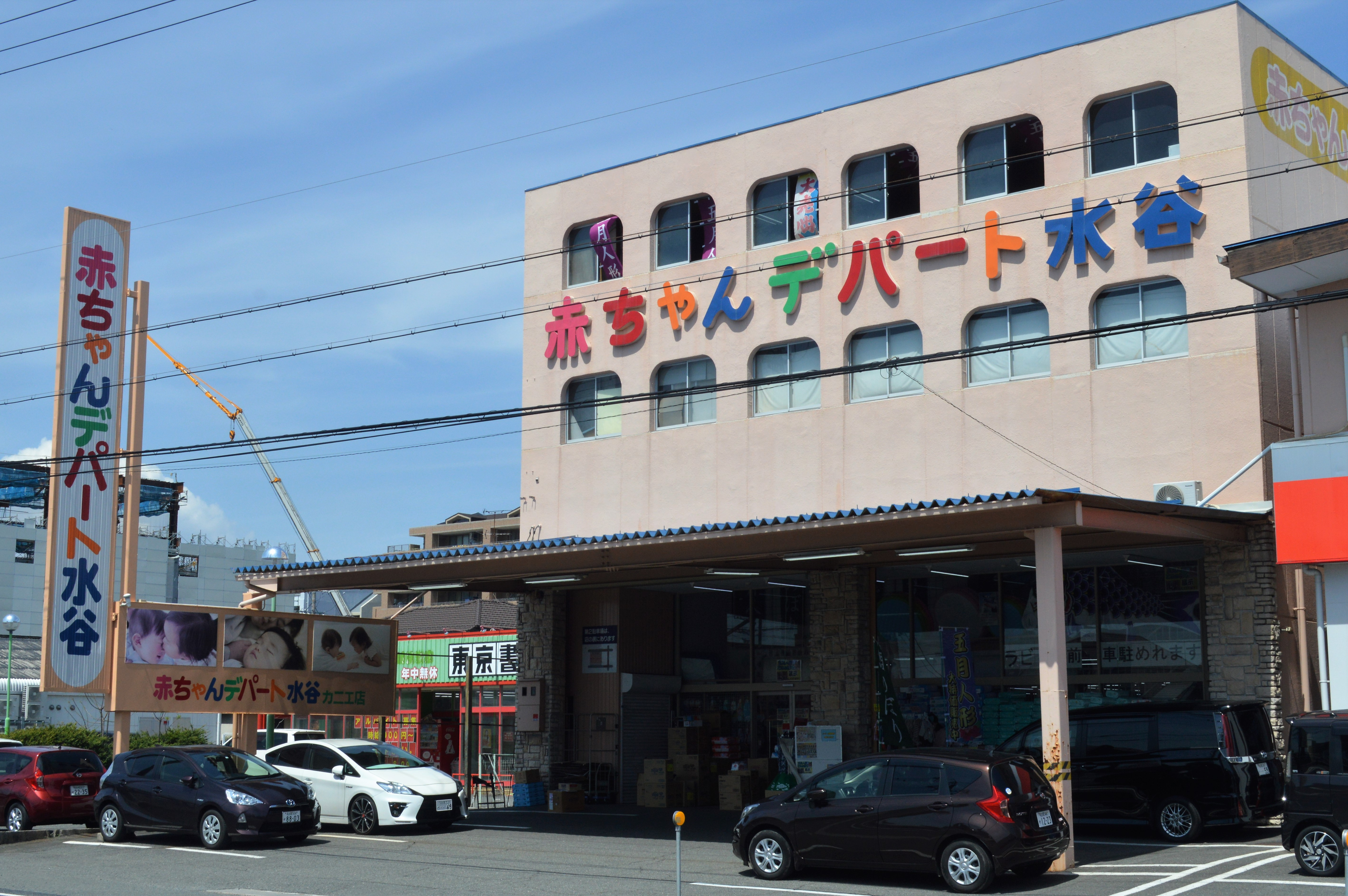 愛知県海部郡蟹江町にある赤ちゃんデパート水谷蟹江店。